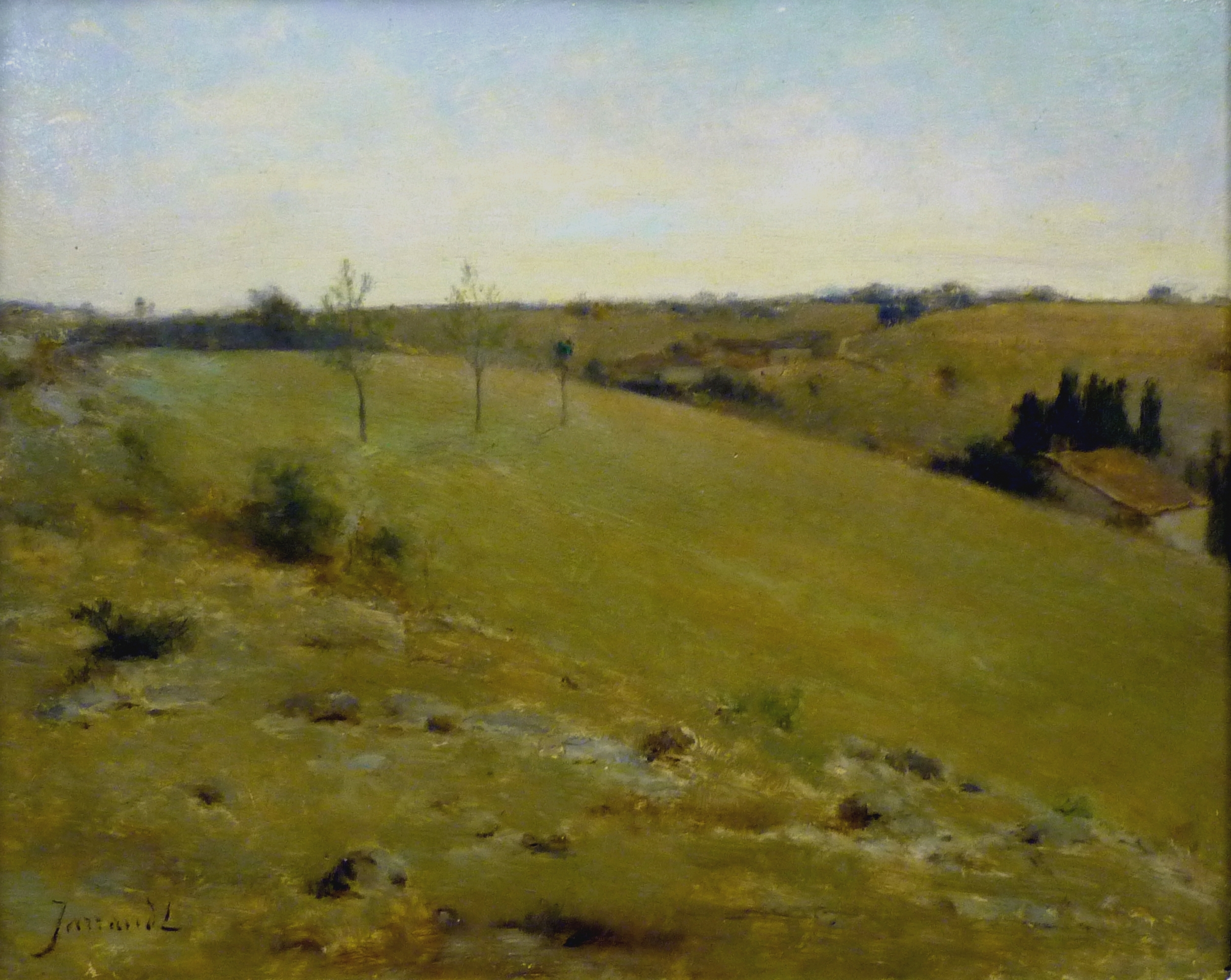 Léonard Jarraud : Paysage (27,8 x 38 cm), non daté. Les chaumes, près de La Couronne. Musée d'Angoulême, Charente (France).